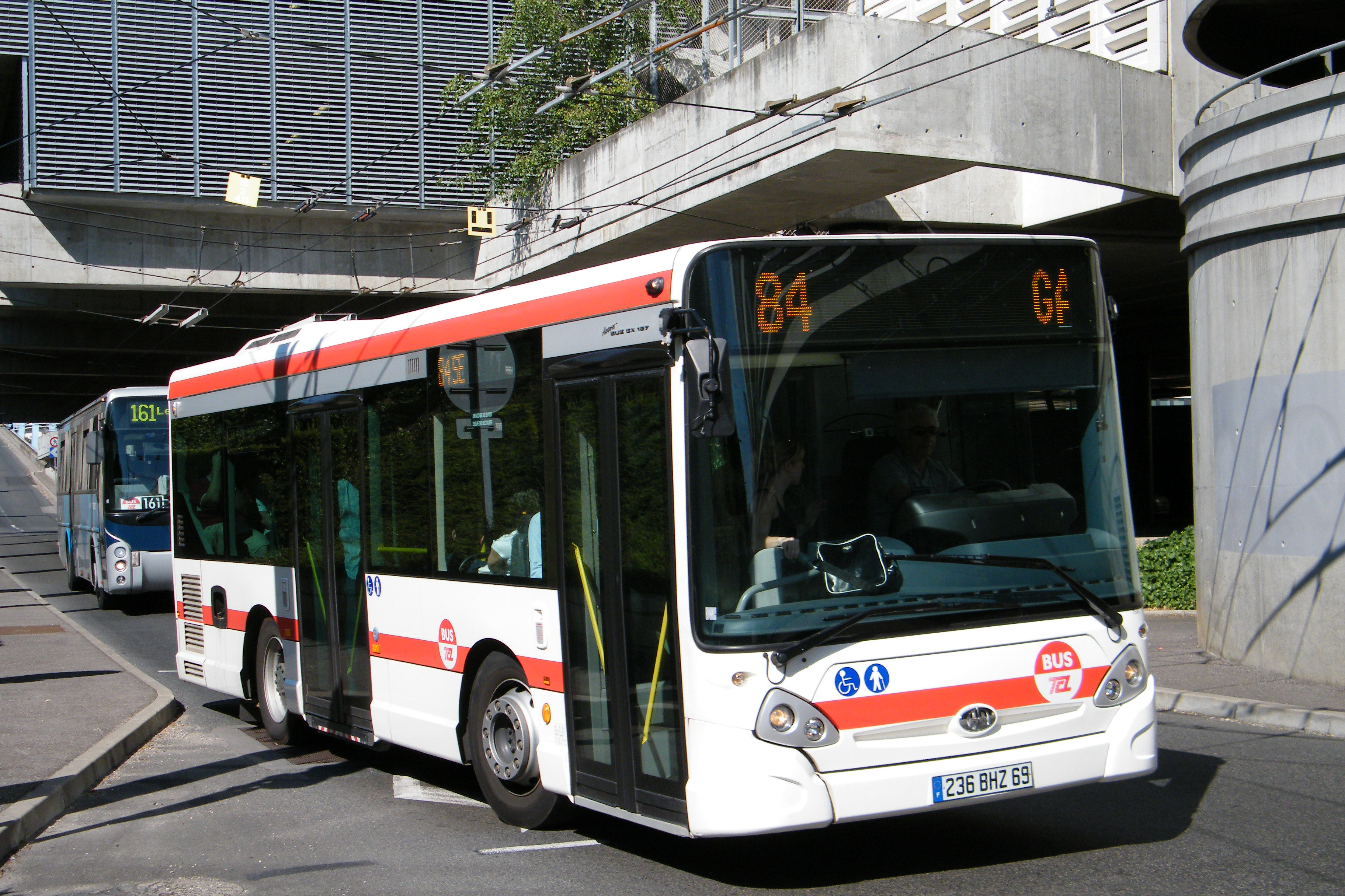 Cet Heuliez GX127 de la société Véolia Transport (Genay) arrive à la Gare de Vaise, sur la Ligne 84 du réseau TCL.